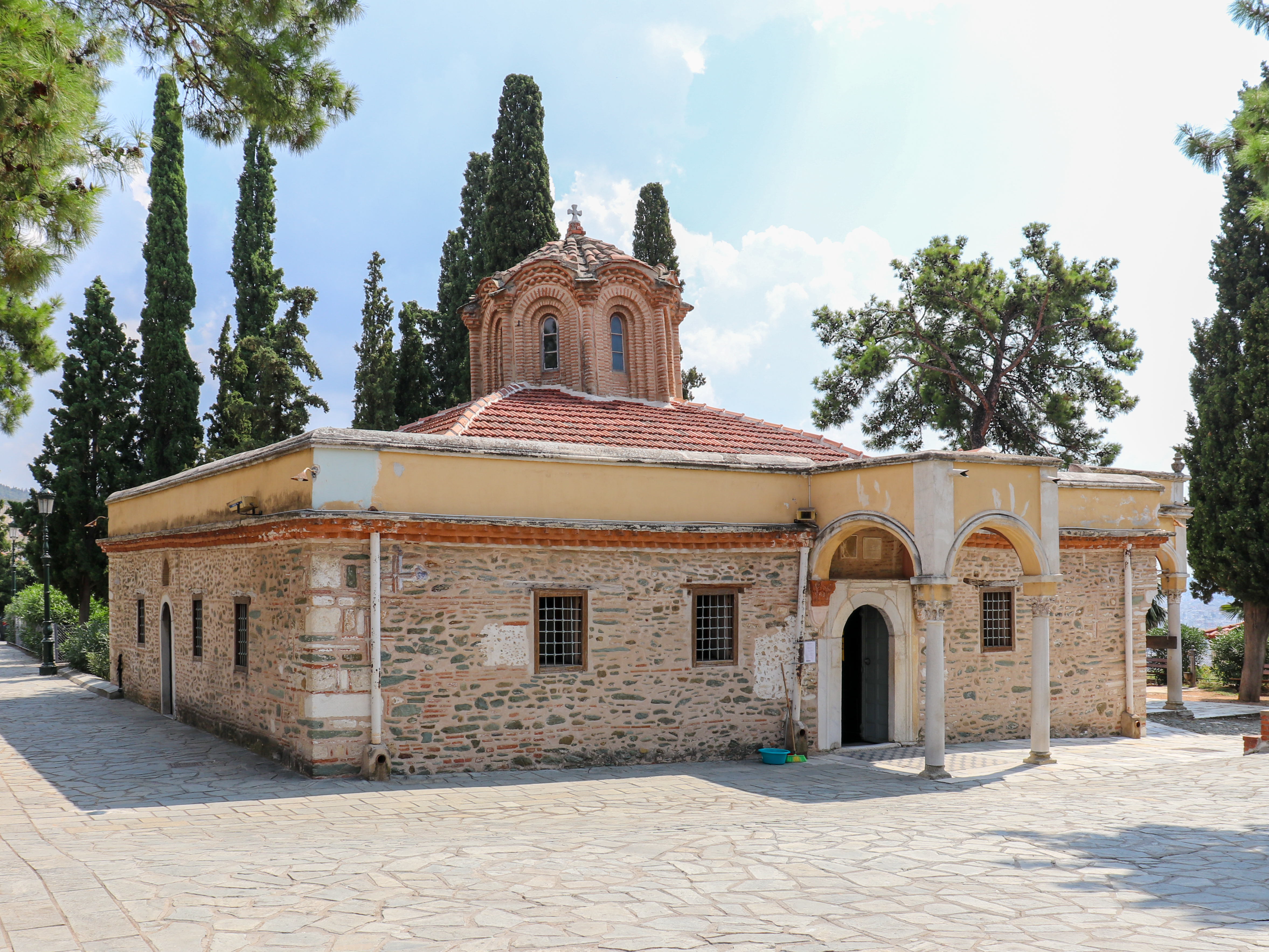 Монастырь Влатадон